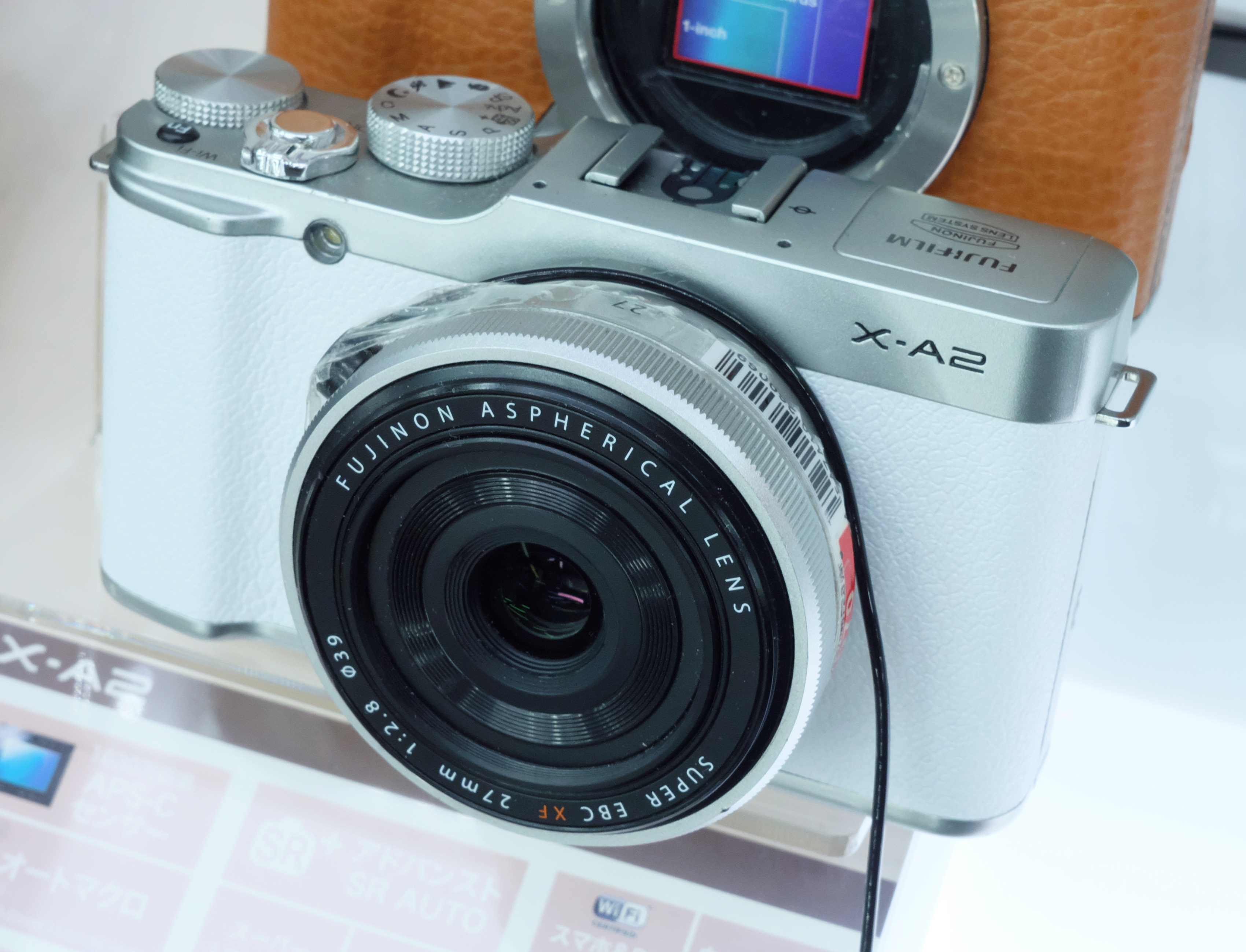 FUJIFILM X-A2（ヨドバシカメラにて撮影）